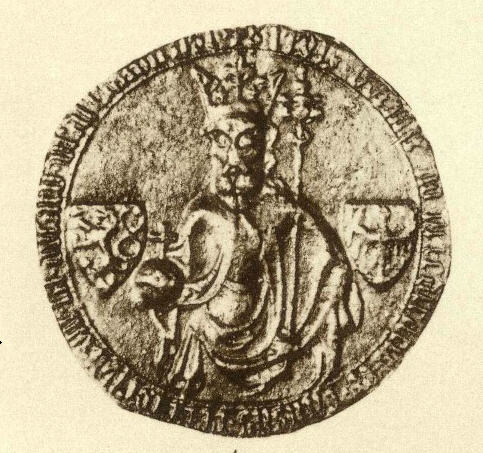 This is a scan of the historical document: Title: Die Siegel der deutschen Kaiser und Könige v. 2 (1347 - 1493)